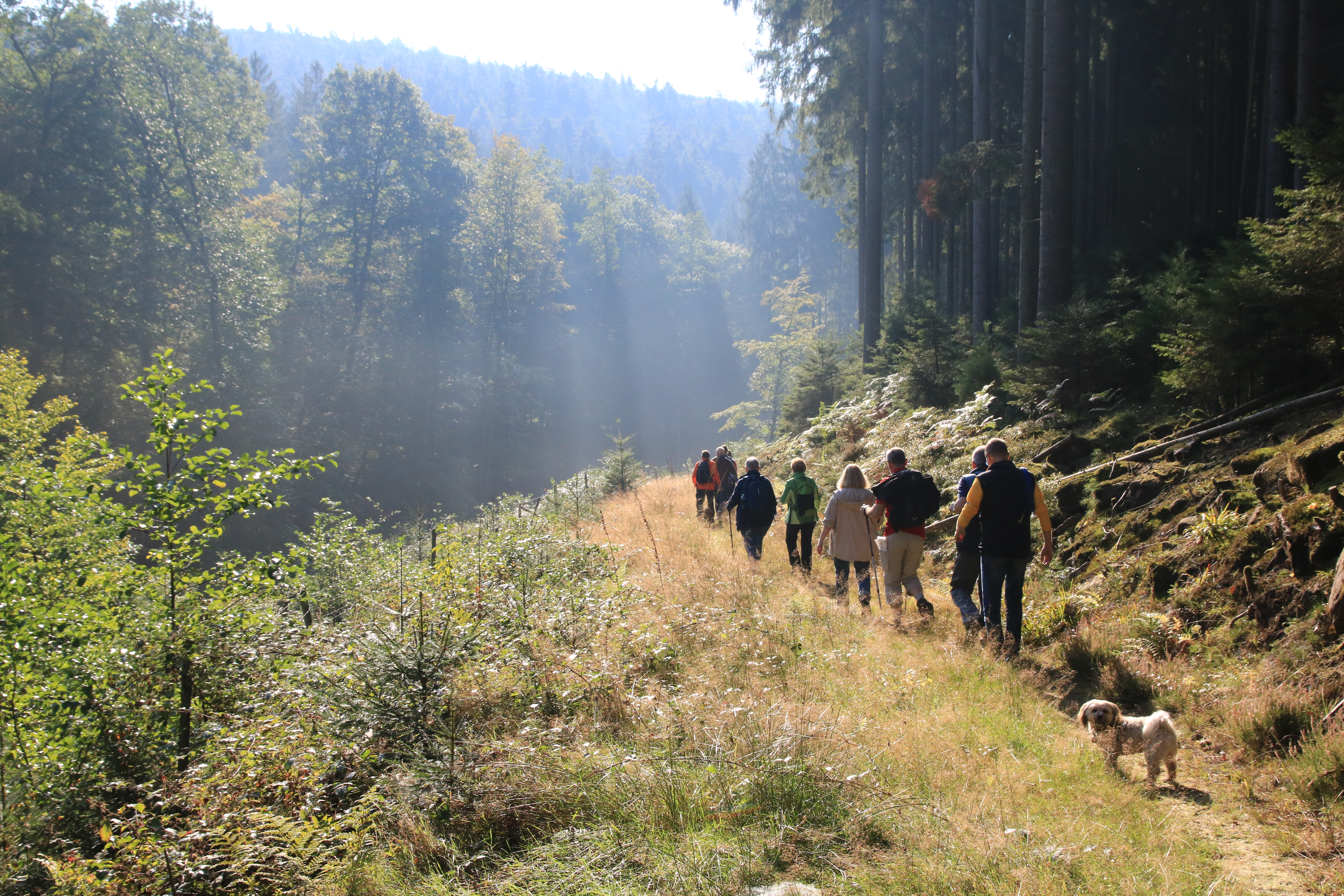 Eine Wanderung im September durch das Dürr-Ellenbacher Tal, Naturschutzgebiet „Dürr-Ellenbachtal von Wald-Michelbach“, Naturpark Bergstraße/Odenwald